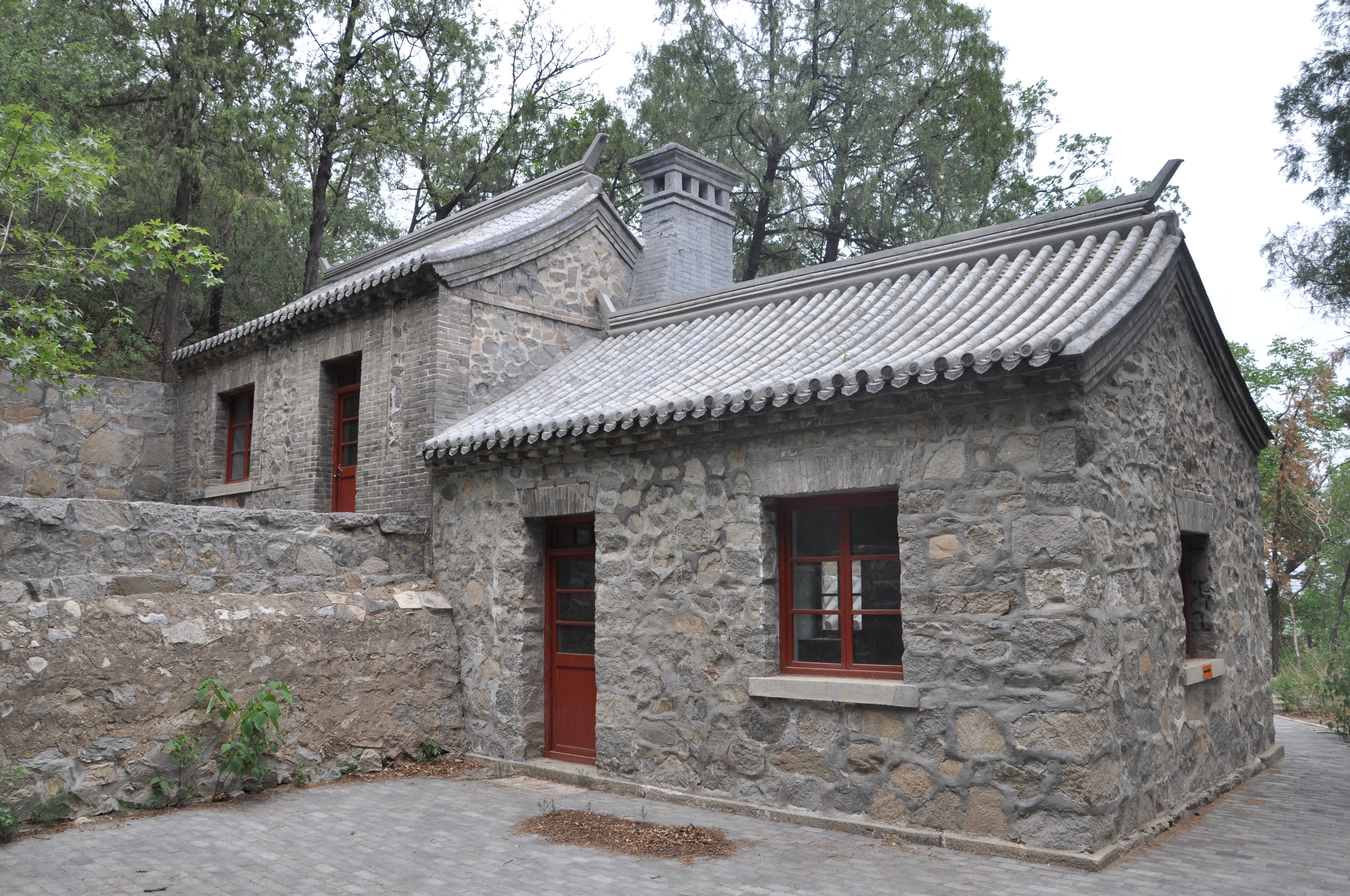 贝家花园南房，平台上部